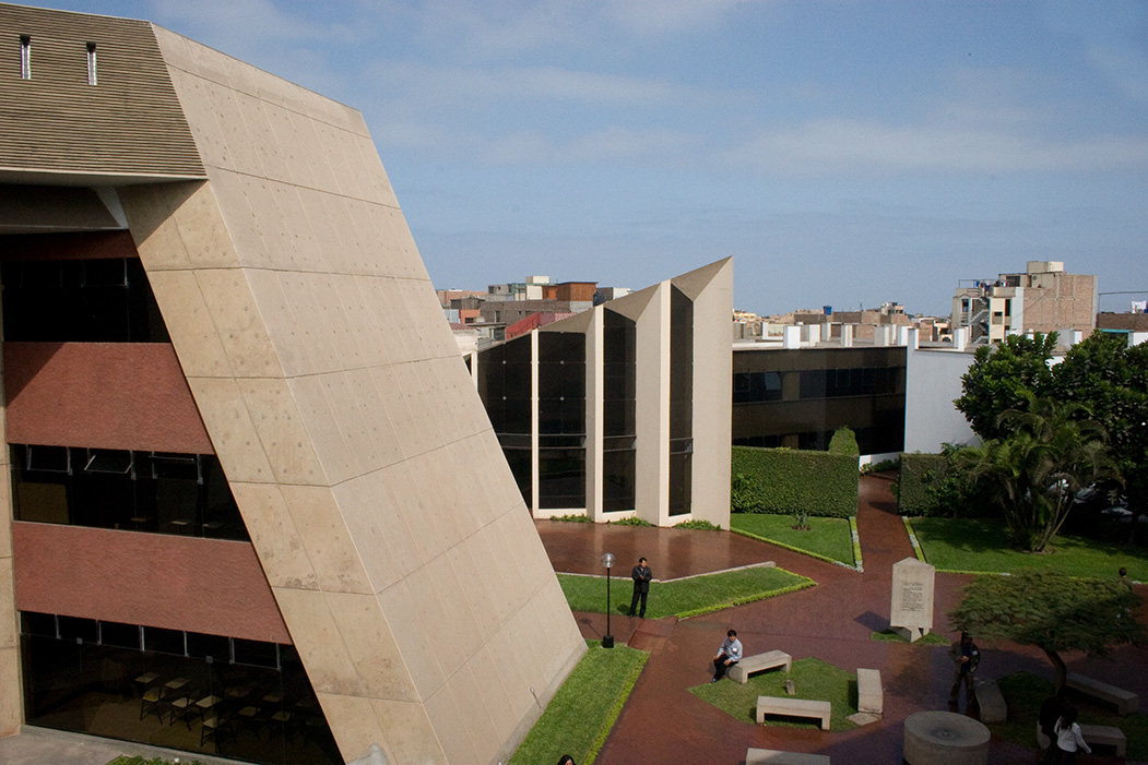 Campus universitario de la Facultad de Teología Pontificia y Civil de Lima.